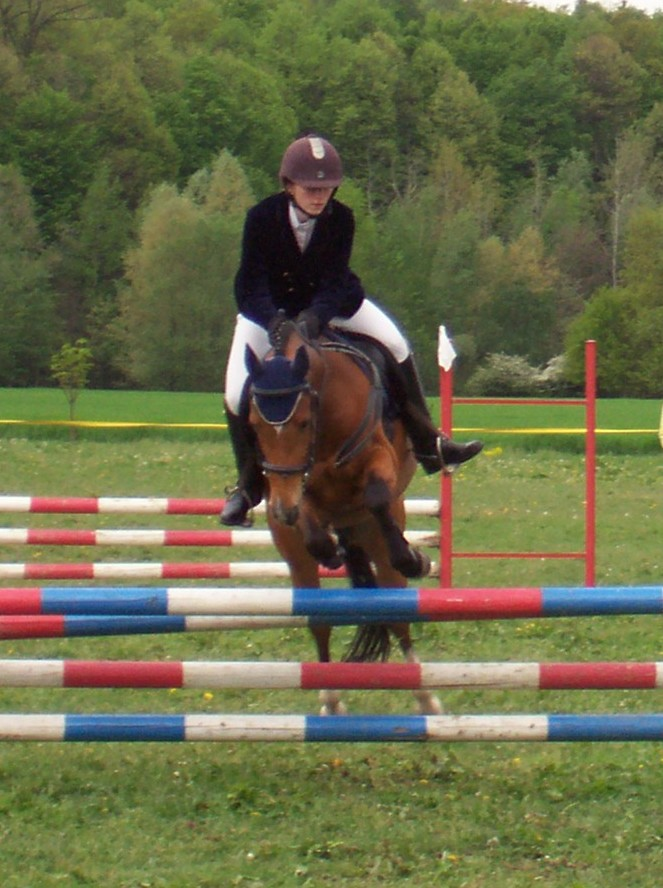 hnědák